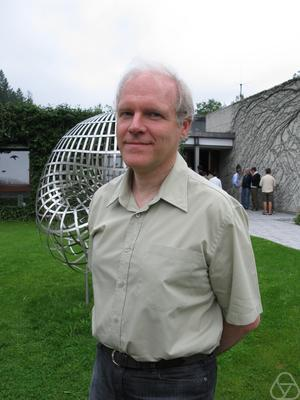 Jean-Pierre Demailly, mathématicien français, à Oberwolfach en 2008